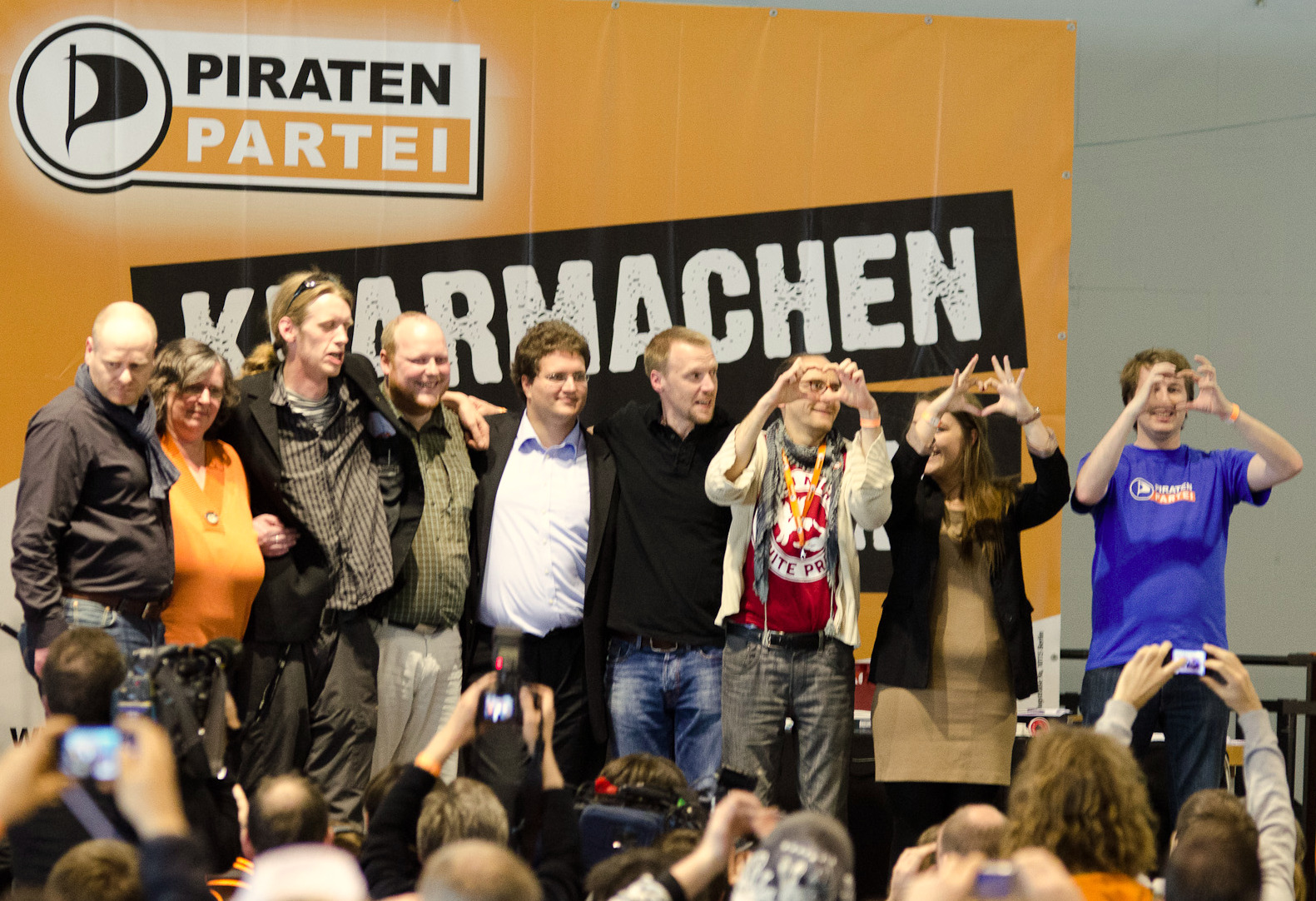 Bundesvorstand 2012 der Piratenpartei Deutschland